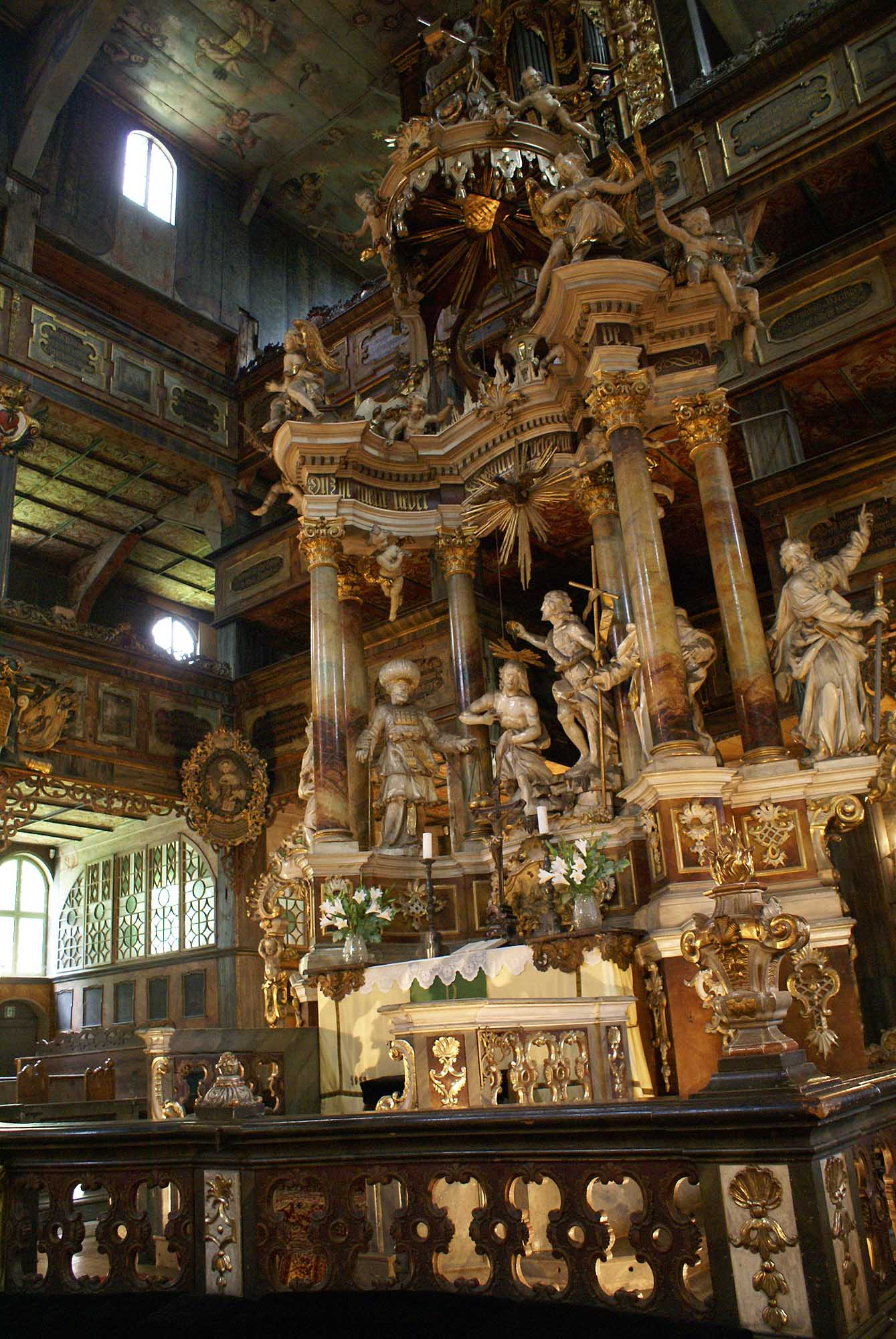 Świdnica, kościół ewangelicki (Pokoju), poł. XVII, XVIII